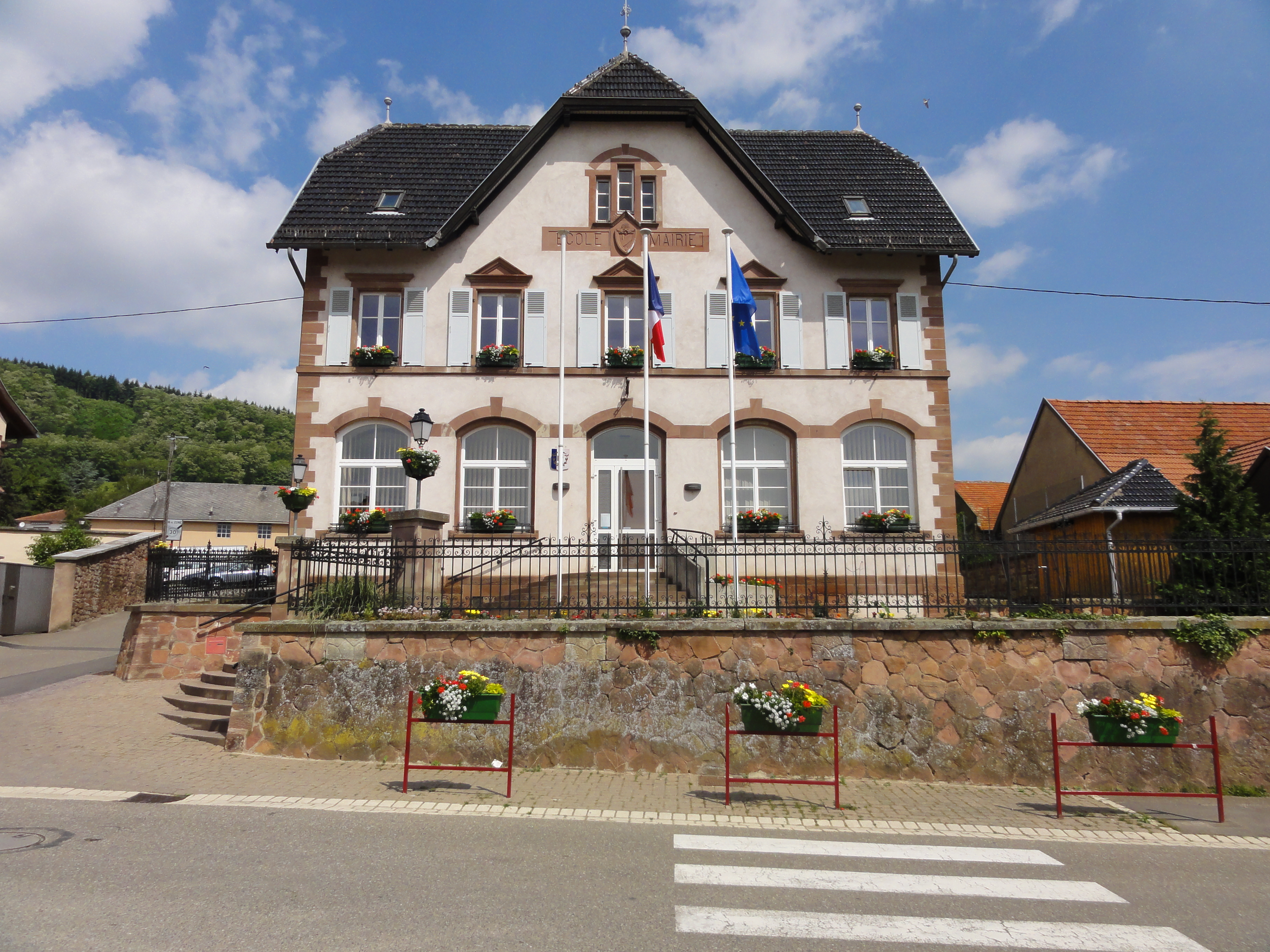 Alsace, Bas-Rhin, Wangen, Mairie-école (1902): .